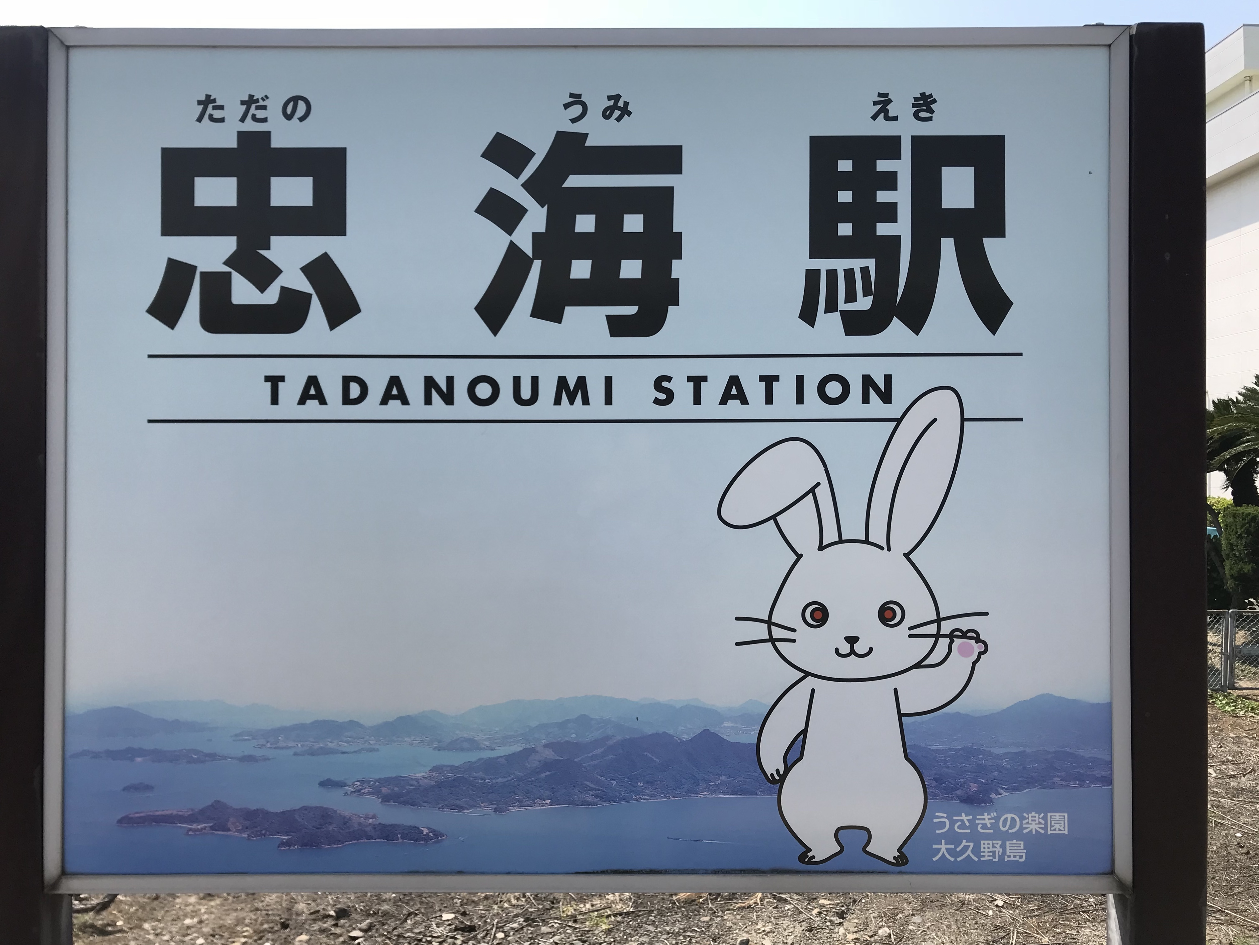 安浦駅の駅名標。イラストは「うさぎの楽園・大久野島」